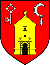 Wappen von Ozalj